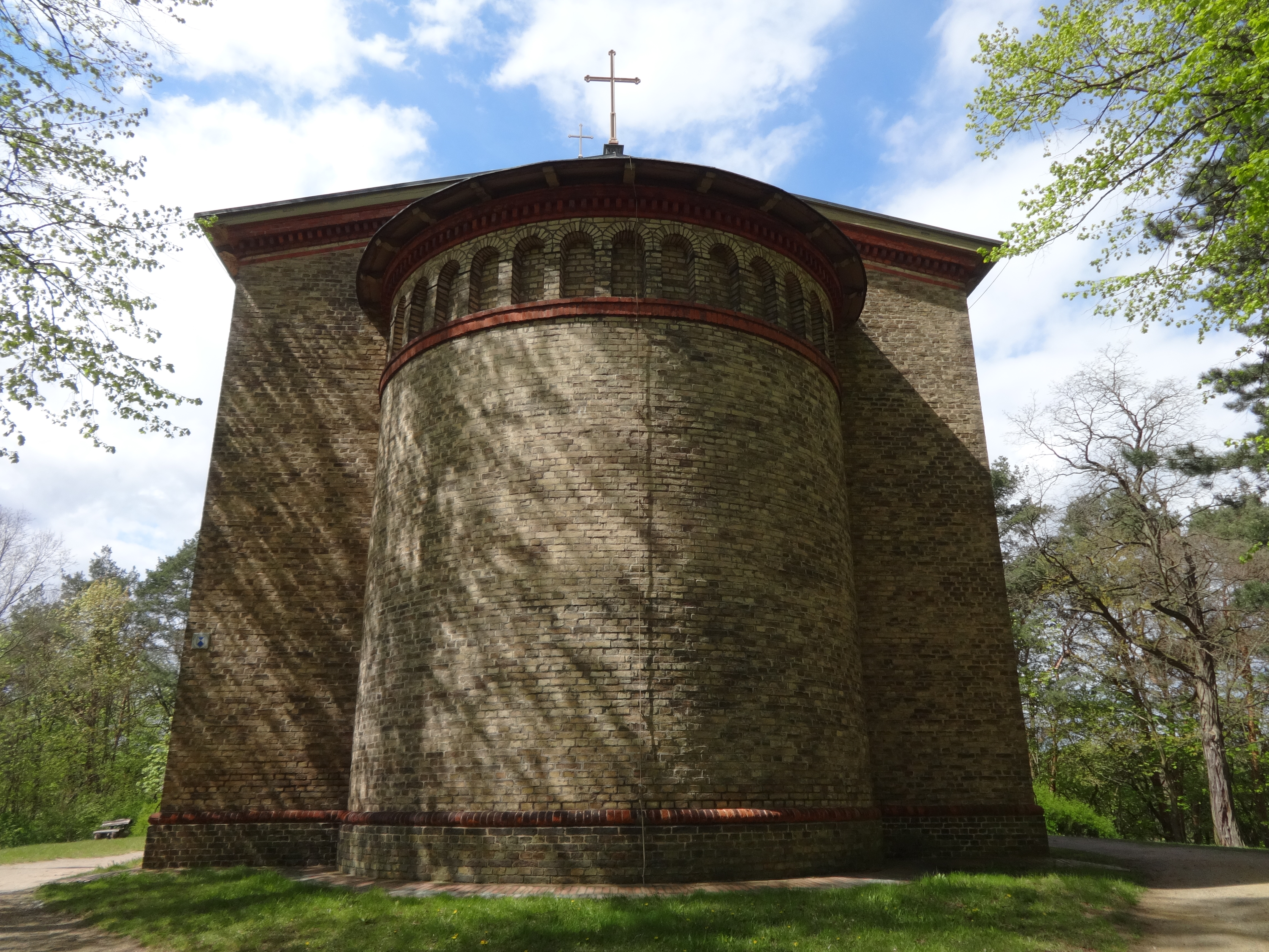 Die Dorfkirche Petzow ist ein ehemaliger, neuromanischer Sakralbau, der in den Jahren 1841 und 1842 nach einem Entwurf von Karl Friedrich Schinkel errichtet wurde. Nach seinen Entwürfen fertigten Handwerker auch den schlichten und hölzernen Altar mit einem Kruzifix aus Gußeisen, die Kanzel sowie eine Fünte aus Eichenholz an. 1988 entwidmet und für 99 Jahre an das Landratsamt verpachtet dient sie seit 1994 dem Landkreis als Veranstaltungsort für Konzerte, Ausstellungen sowie als Standesamt.